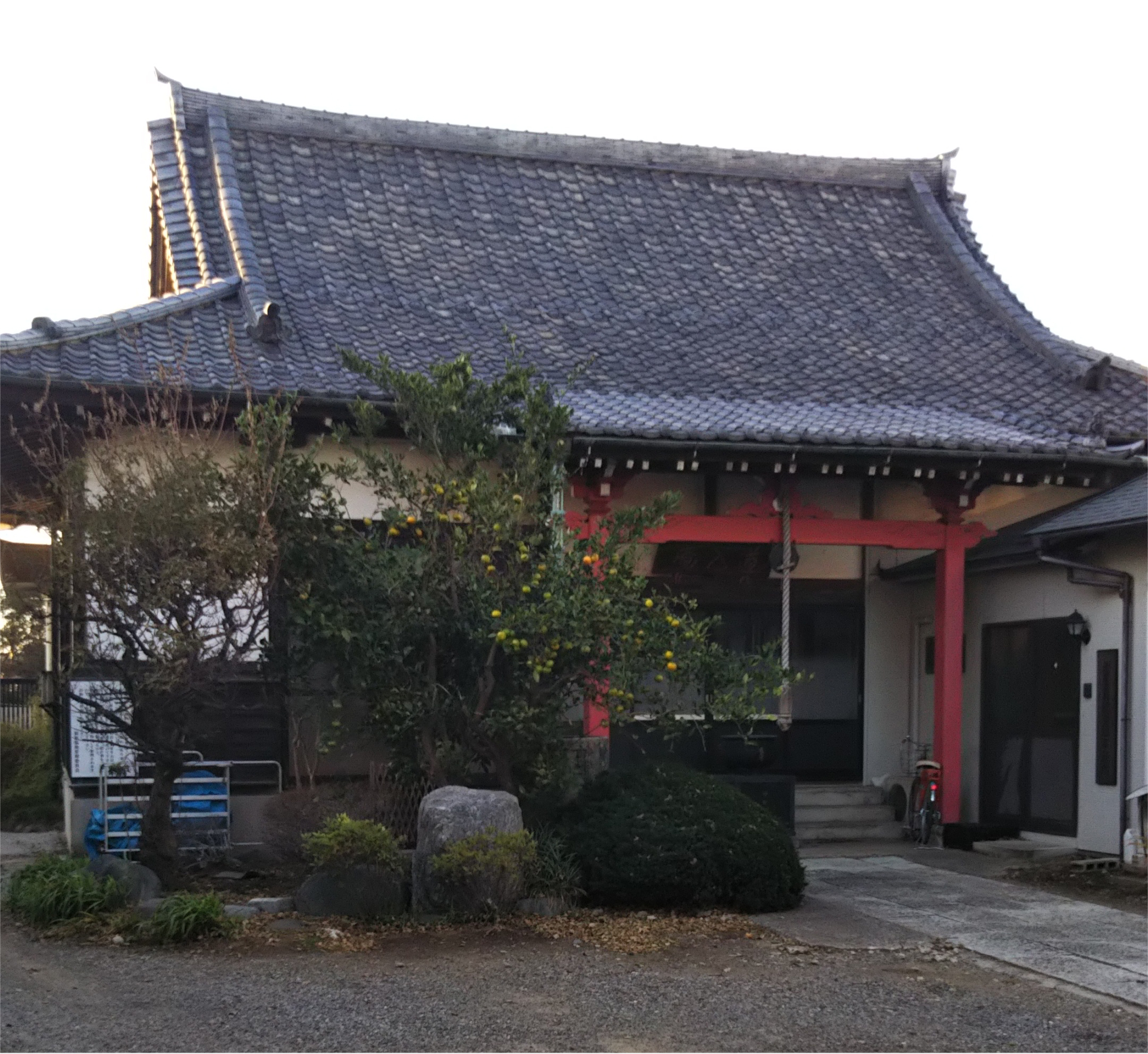 船橋前原地区にある寺院（道入庵）の写真